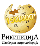 Jubilarni logo za 150.000 članaka.